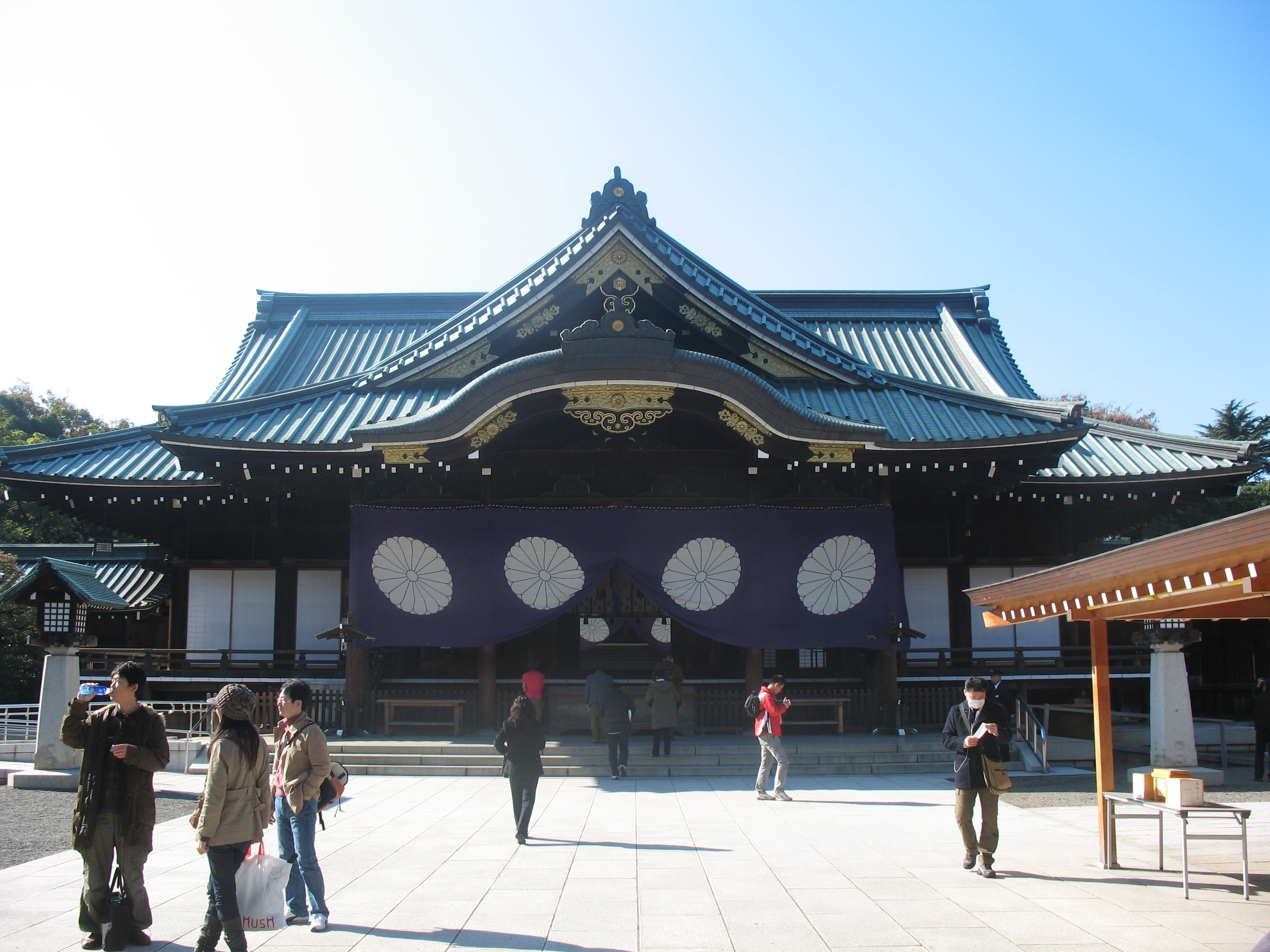 2009年11月23日（新嘗祭）に靖国神社